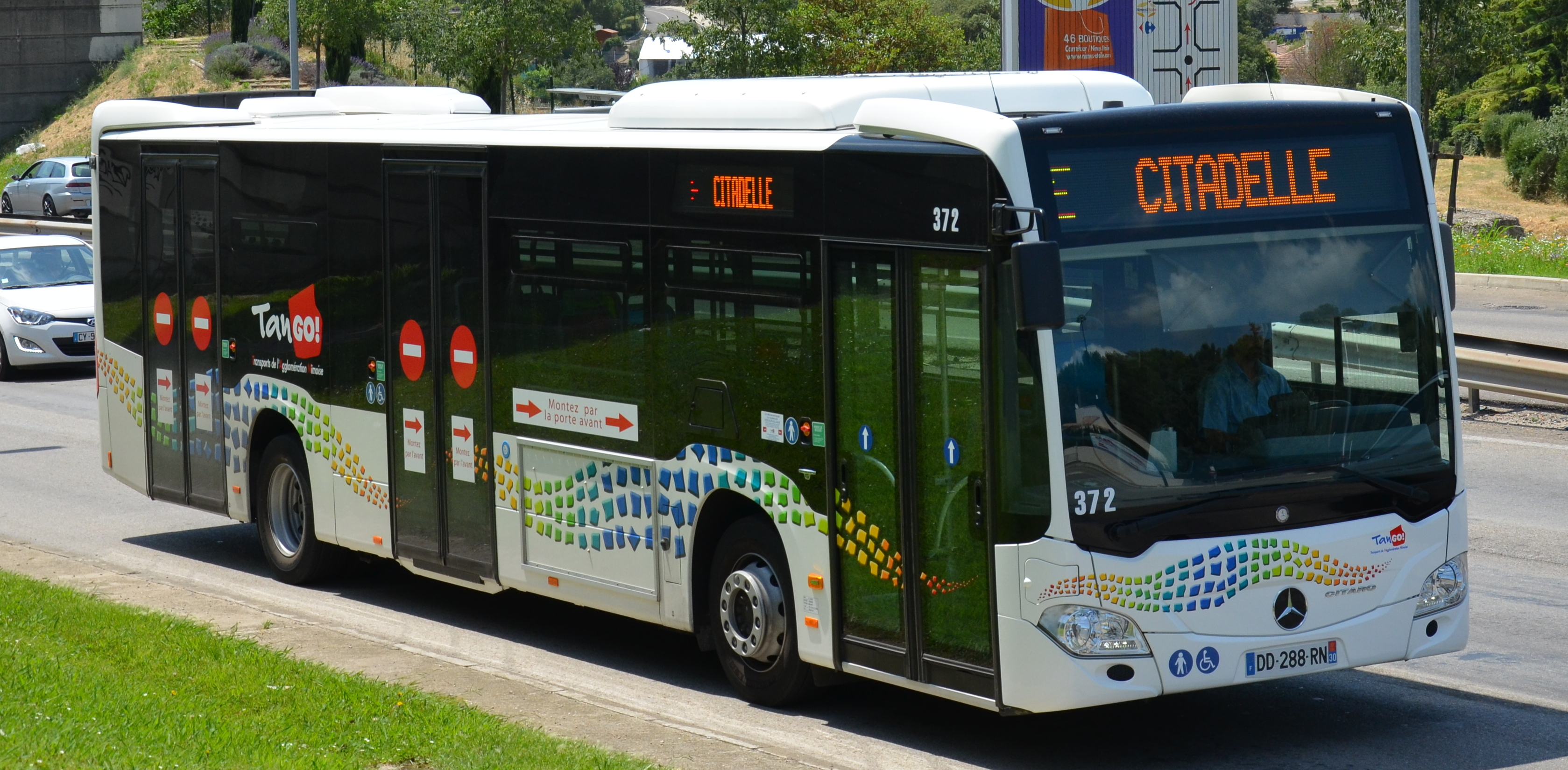 Mercedes Citaro C2 Tn°372 de la ligne E du réseau TANGO de Nîmes, près de l'arrêt Romarins.